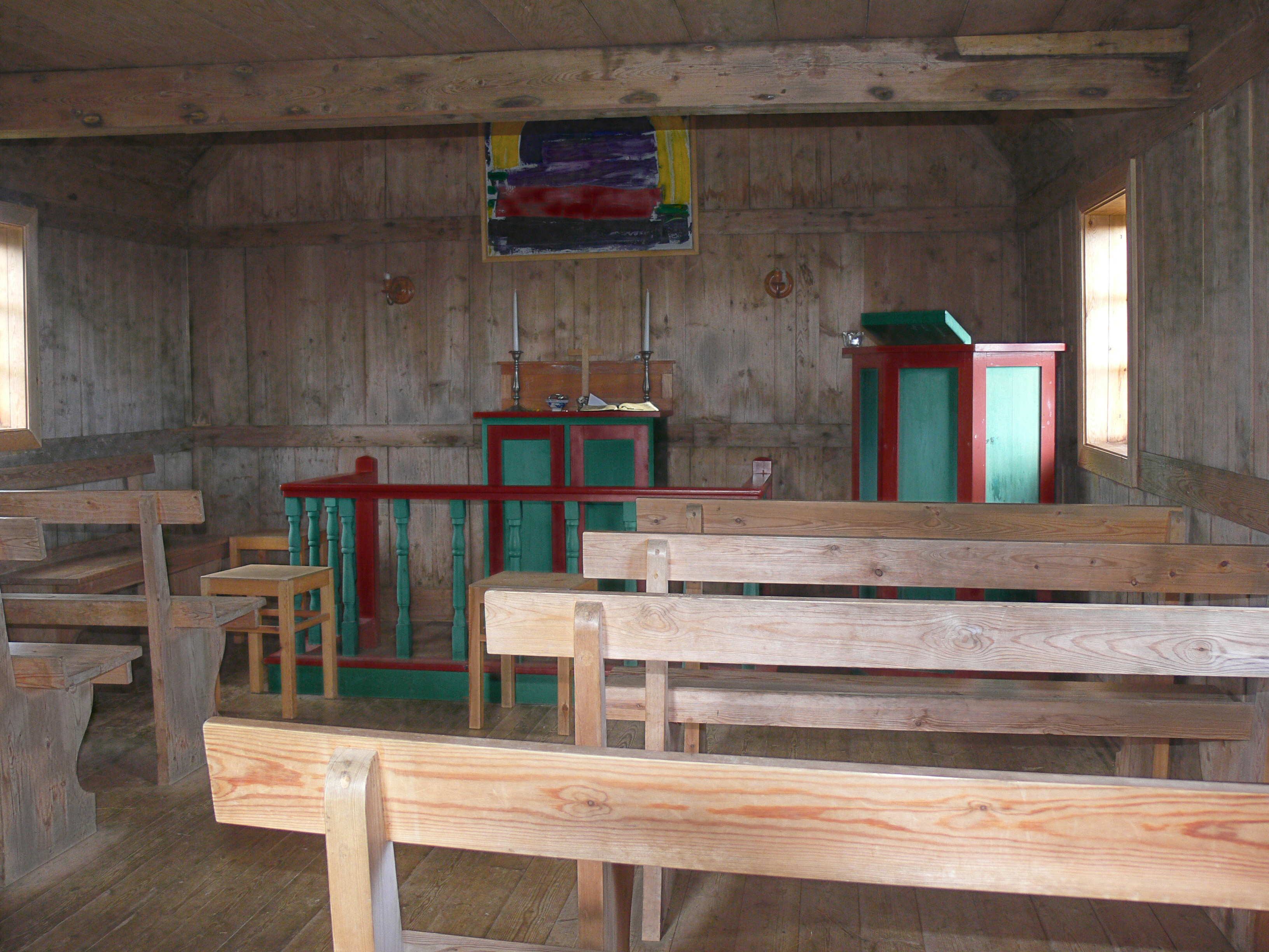 Krýsuvíkurkikja, 1857 erbaut und steht unter der Obhut des Nationalmuseums.